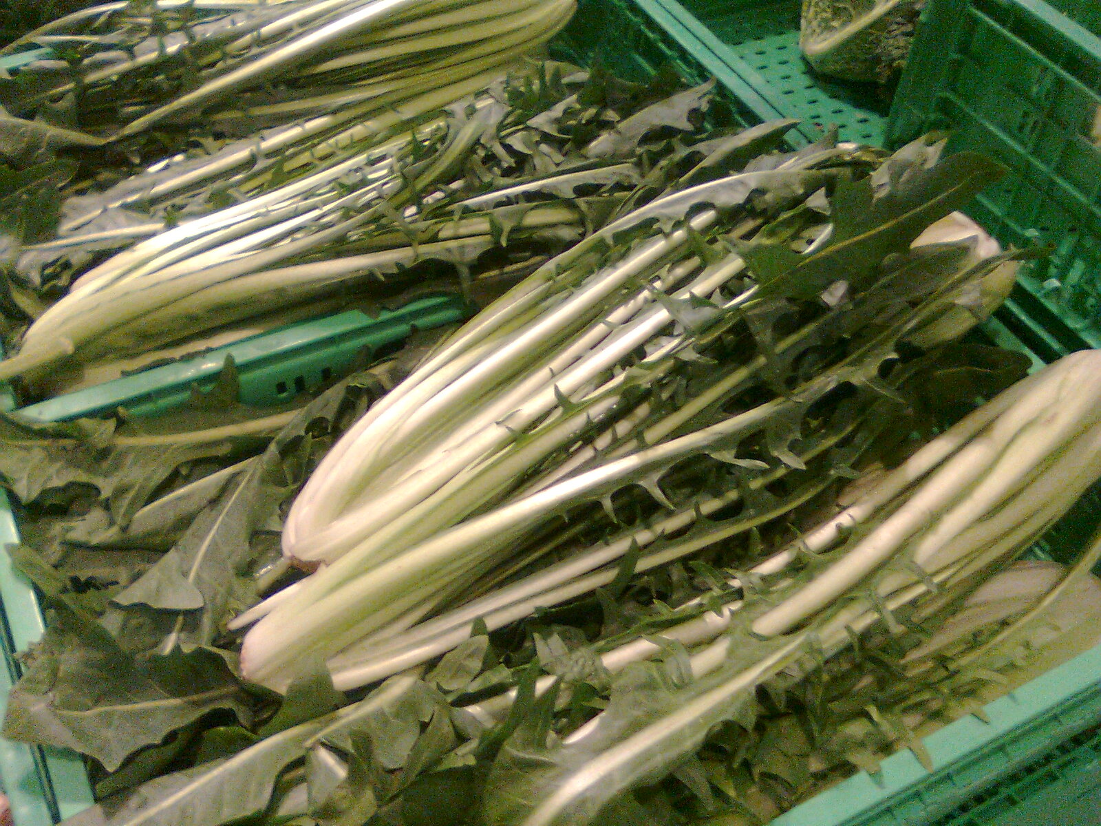 Cykoria catalogna, Wochy, supermarket